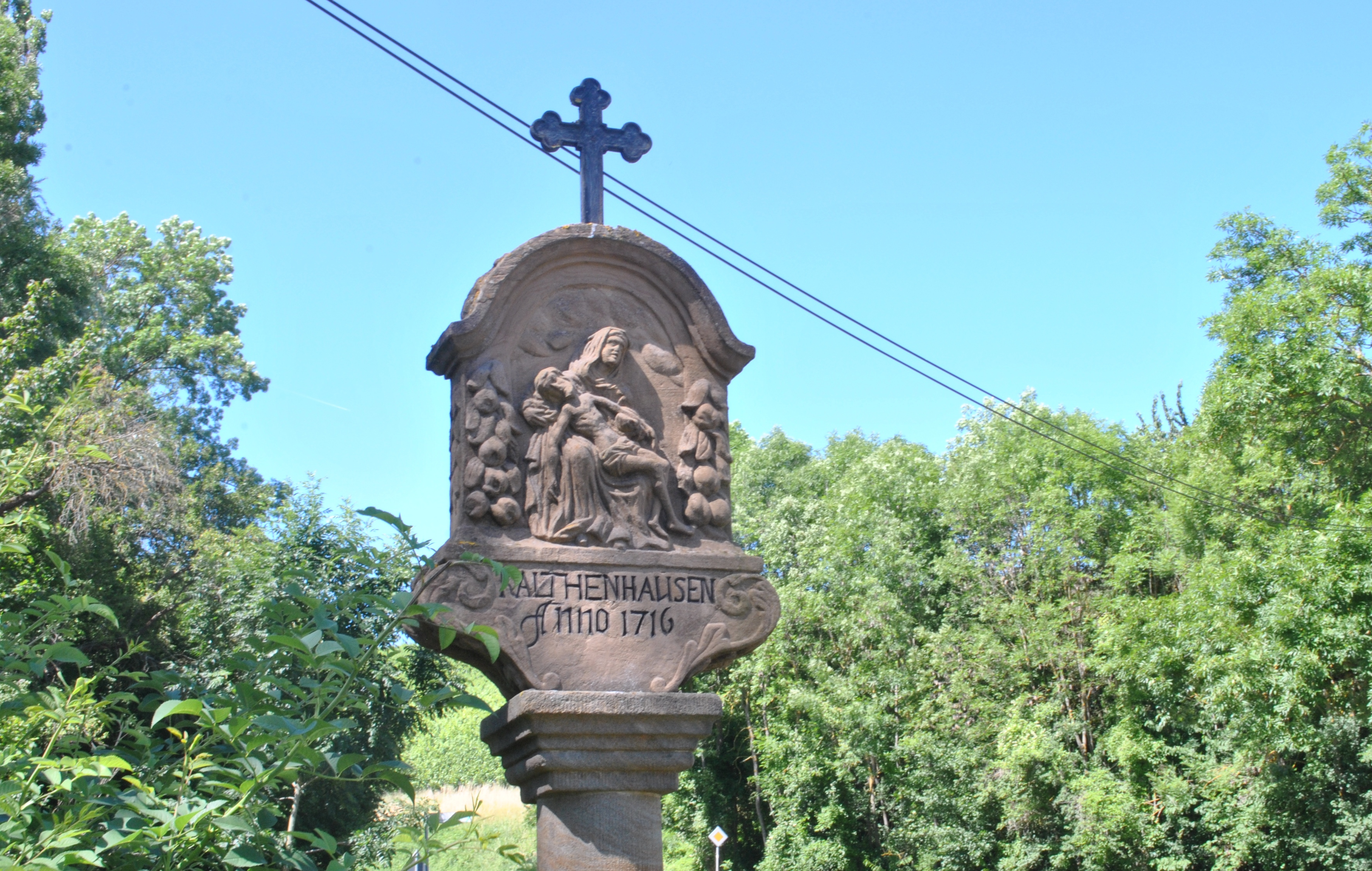 Bildstock Reliefaufsatz mit Pietàdarstellung flankiert von Fruchtgirlanden, auf Säule über Postament, Sandstein, bezeichnet 1716